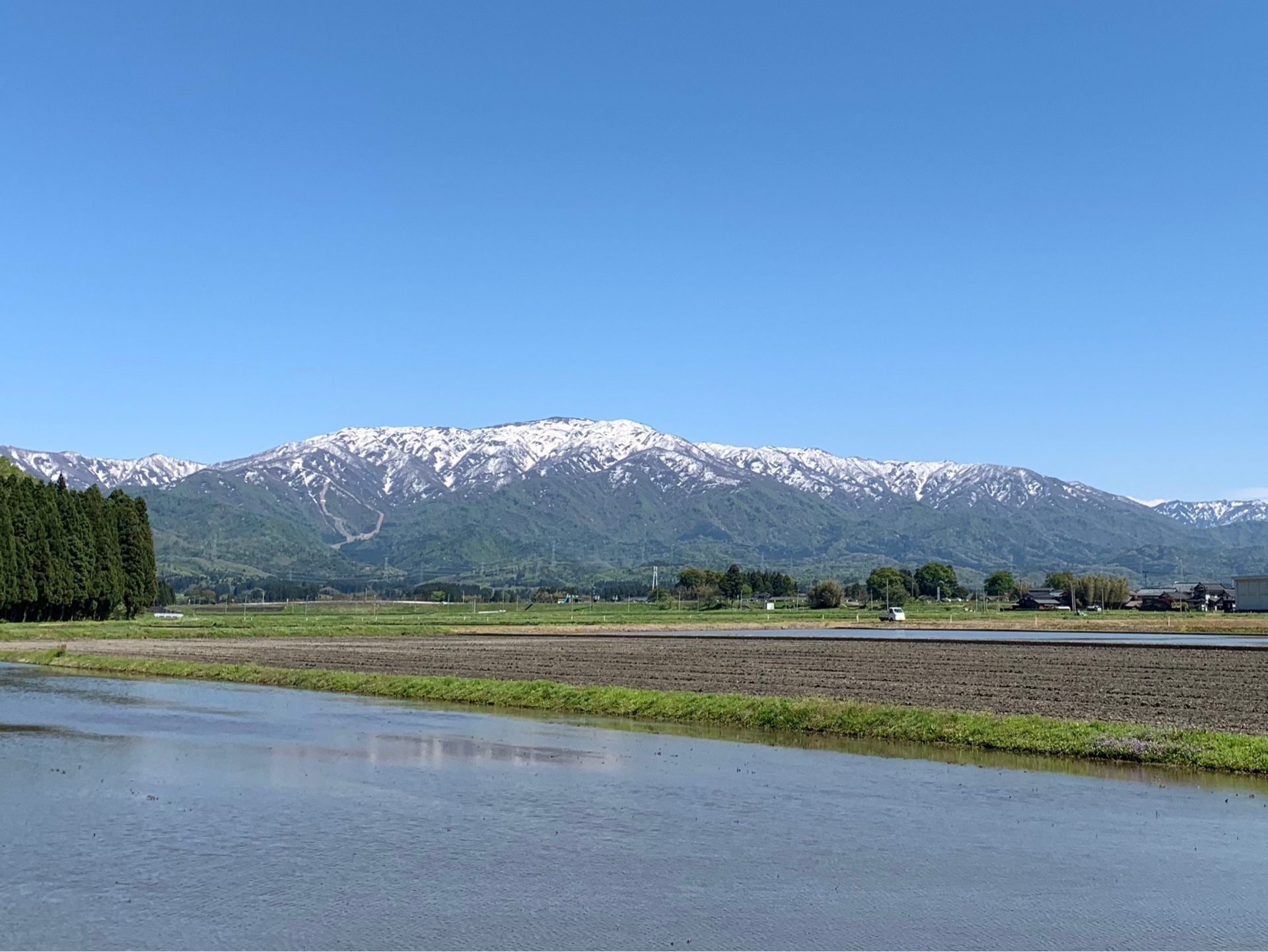 新発田市東宮内付近から見た二王子岳（2019年5月）